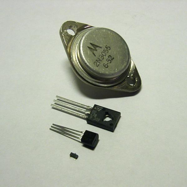 Foto på transistorer Uppifrån: 2N3055, NPN effekttransistor från Motorola, kapseltyp TO3 BD178, PNP effekttransistor från Siemens Technologies, kapseltyp TO126 BC327, PNP småsignalstransistor med kapseltyp TO92 Småsignaltransistor för ytmontering med kapseltyp SOT23 Fotograf: Daniel Ryde, Skövde 2004-08-22 Licens: GFDL